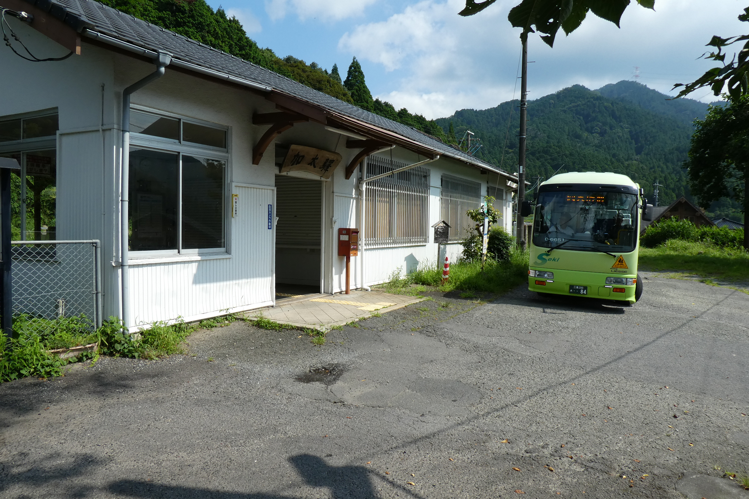 関西本線、加太駅。加太地区福祉バス（関支所前行き）